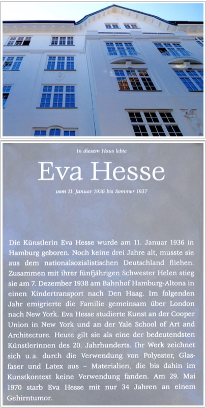 Eva Hesse Geburtshaus und Gedenktafel in der Isestraße 98 in Hamburg